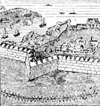 Vestingsmuur met Redan Zeer oude prent zonder auteursrechten